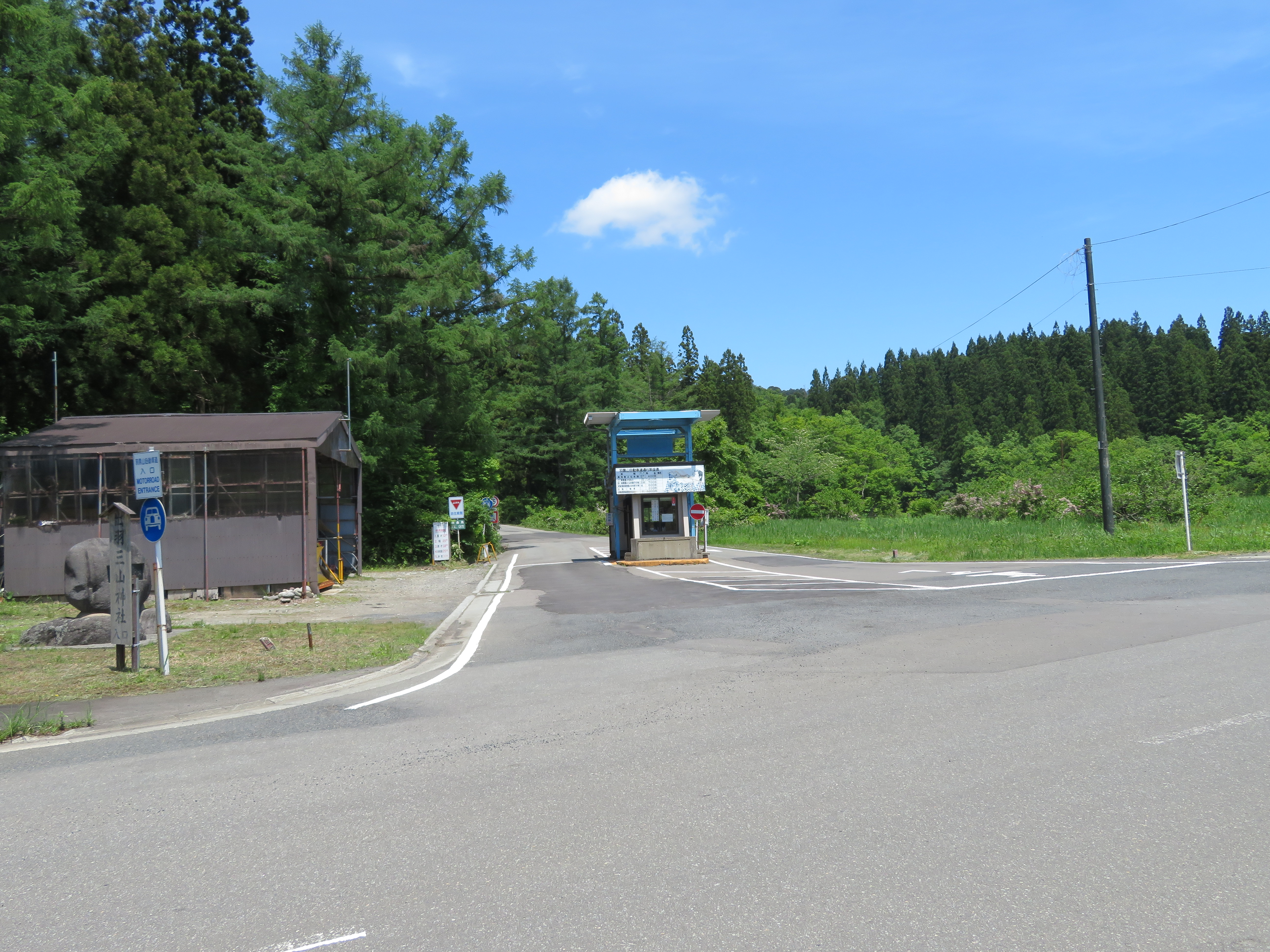 羽黒山自動車道料金所付近 Canon PowerShot SX720 HS